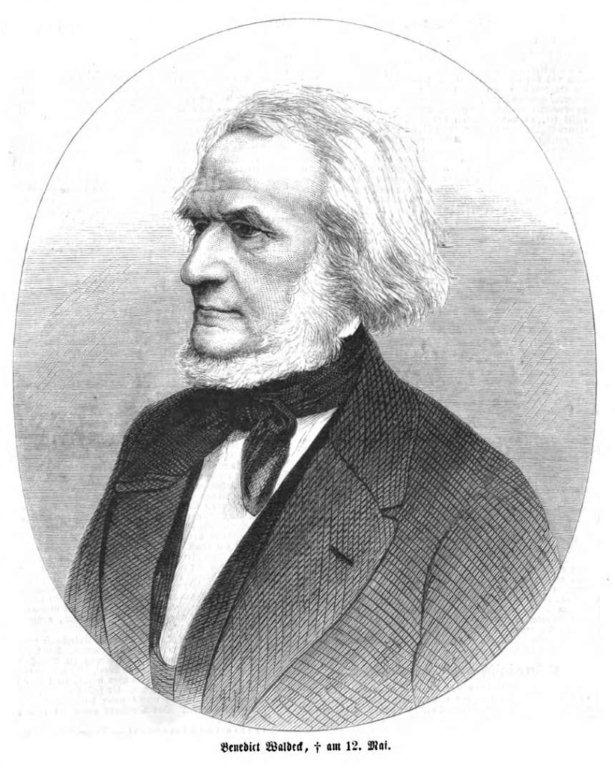 Benedikt Waldeck, deutscher linksliberaler Politiker, Gegenspieler Bismarcks.